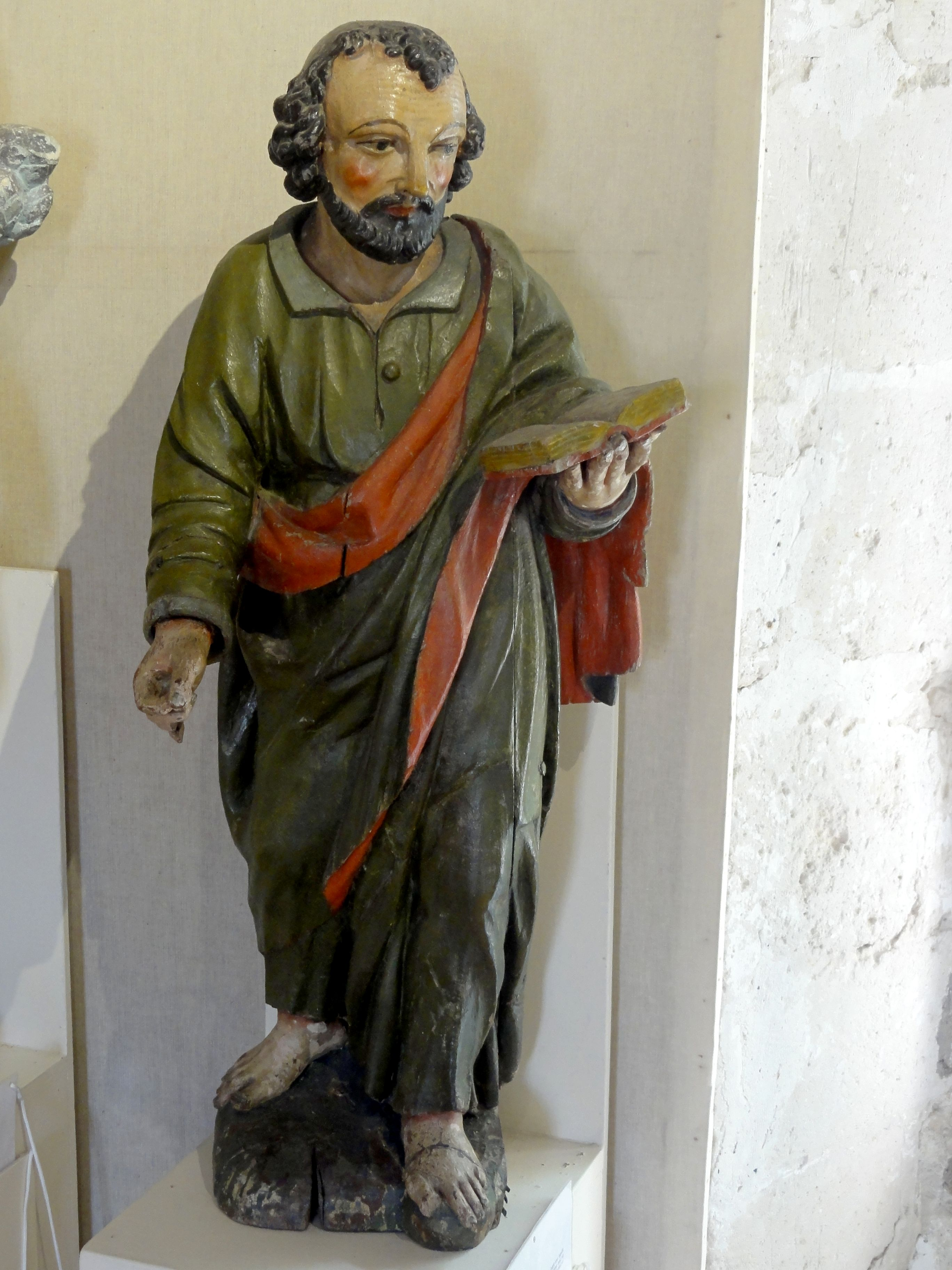 Statue de saint Pierre, XVIe s.